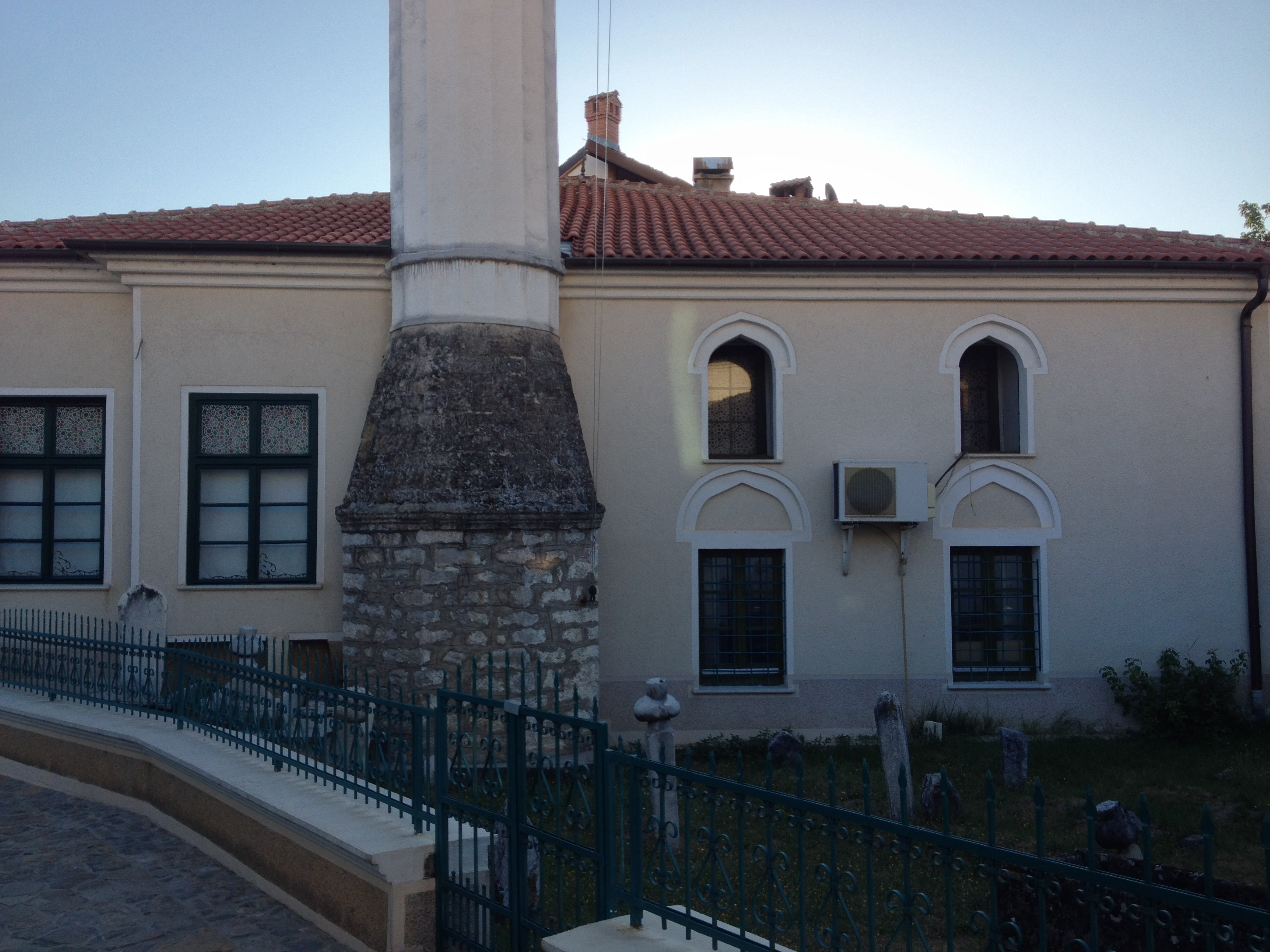 Die Zeynel-Abidin-Pascha-Moschee in Ohrid, Mazedonien